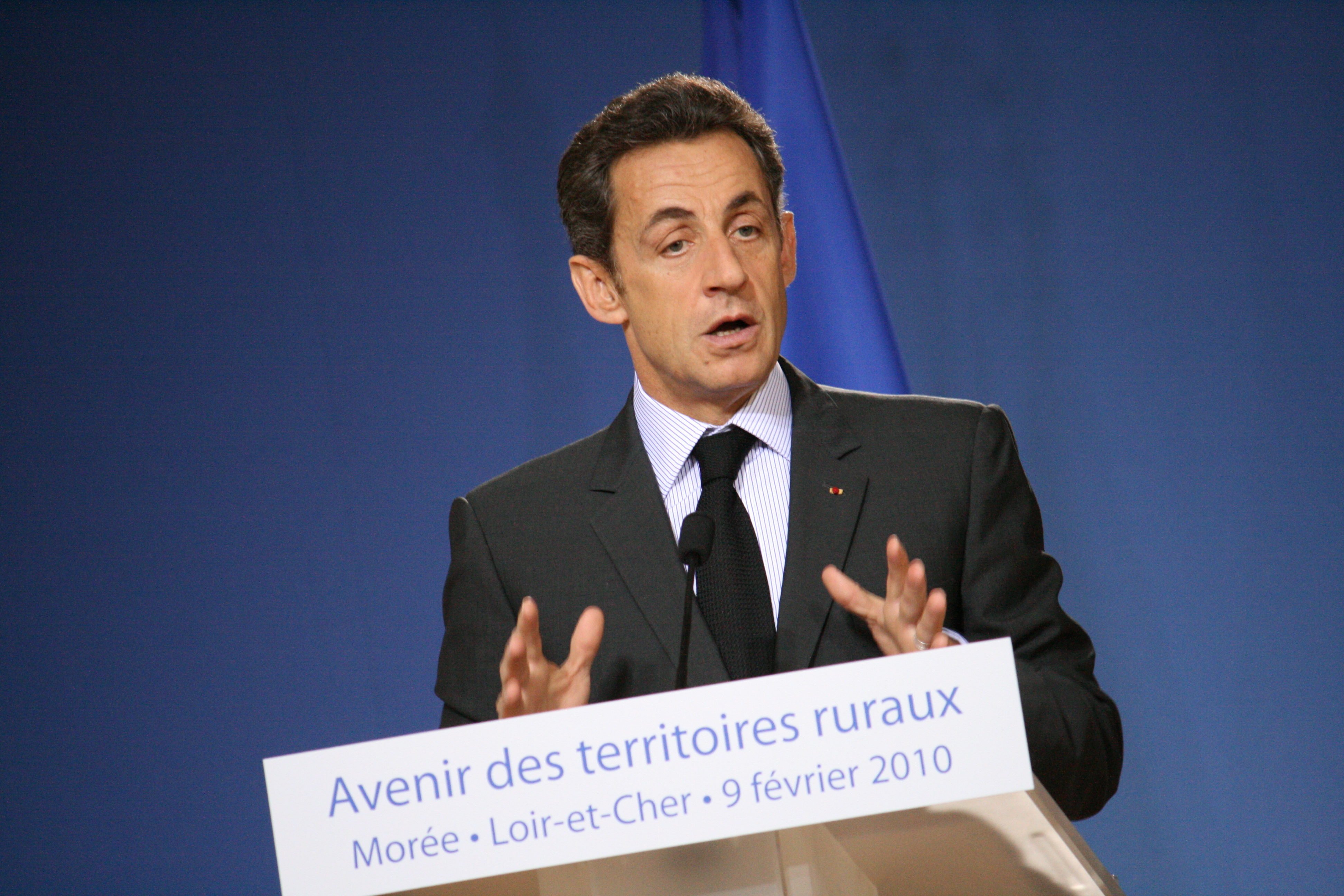 discours sur les territoires ruraux, Morée, 2010